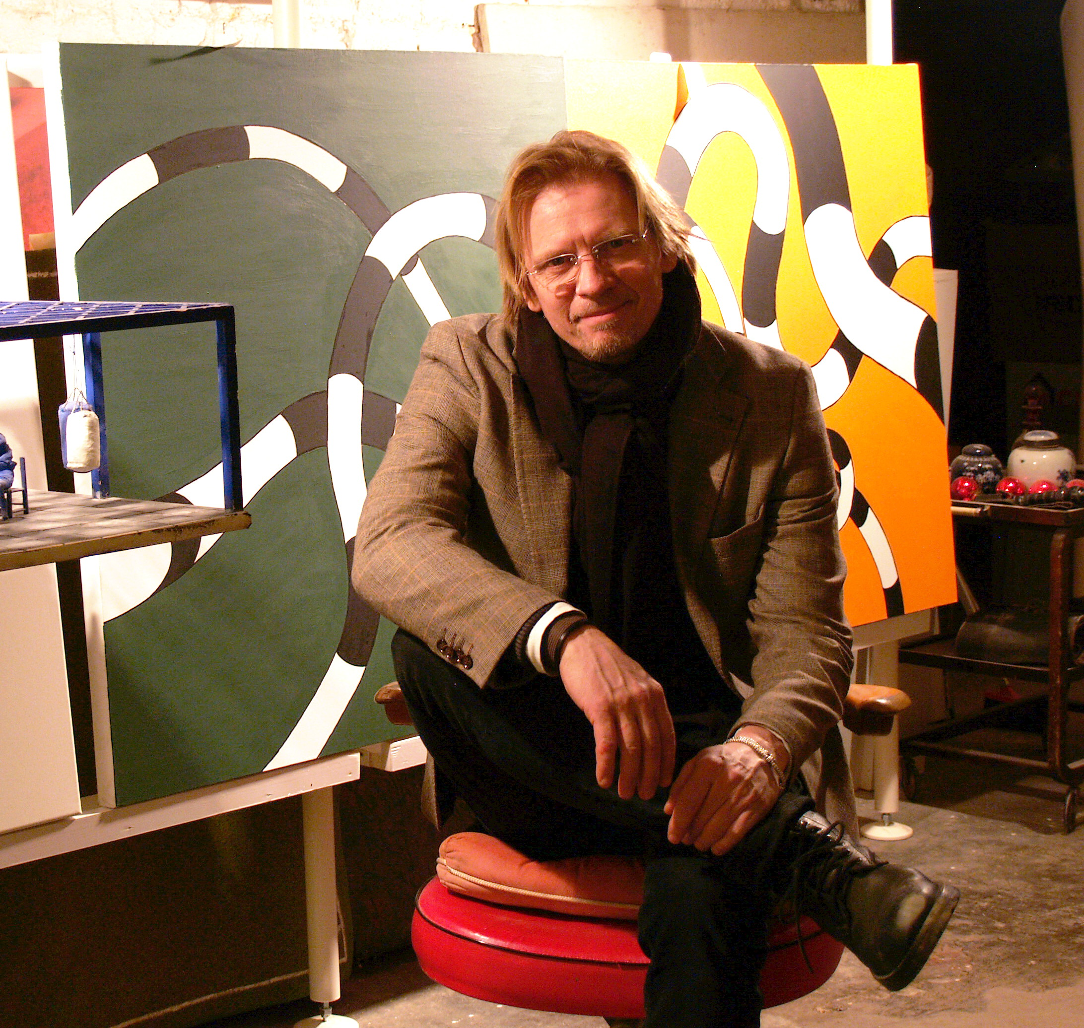 Johan Ferner Ström